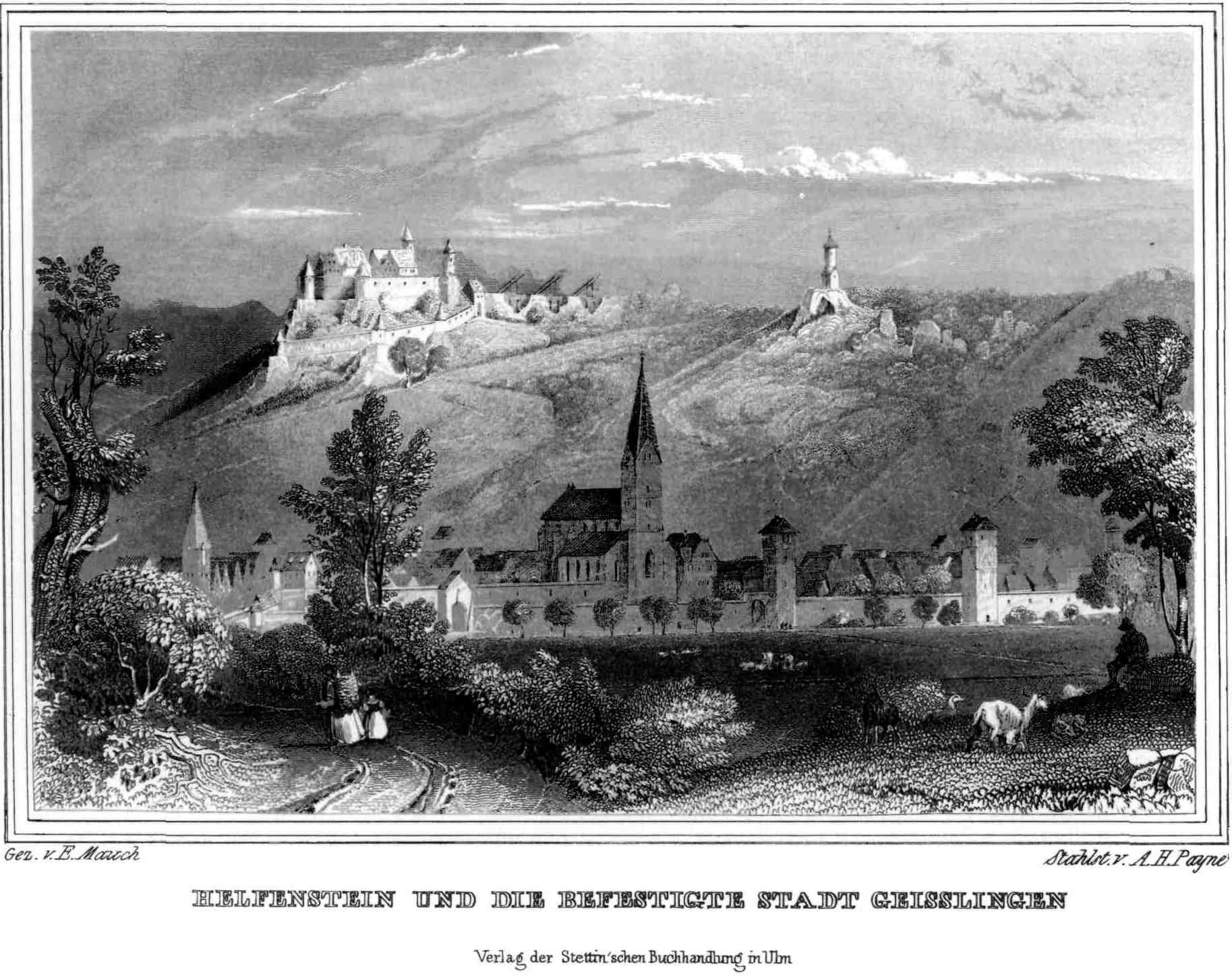 This is a scan of the historical document: Das Königreich Württemberg nebst den von ihm eingeschlossenen Hohenzollern'schen Fürstenthümern in ihren Naturschönheiten, ihren merkwürdigen Städten, Badeorten, Kirchen und sonstigen vorzüglichen Baudenkmalen für den Einheimischen und Fremden dargestellt hrsg. v. Philipp Ludwig Adam, Ulm, 1841